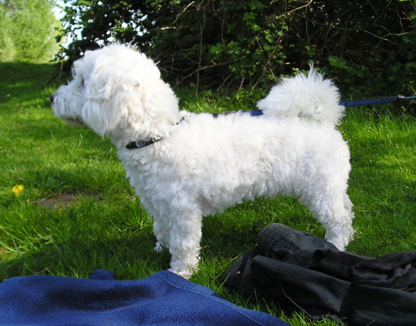 Hund, Rasse Bolonka Franzuska, 8 Monate alt.